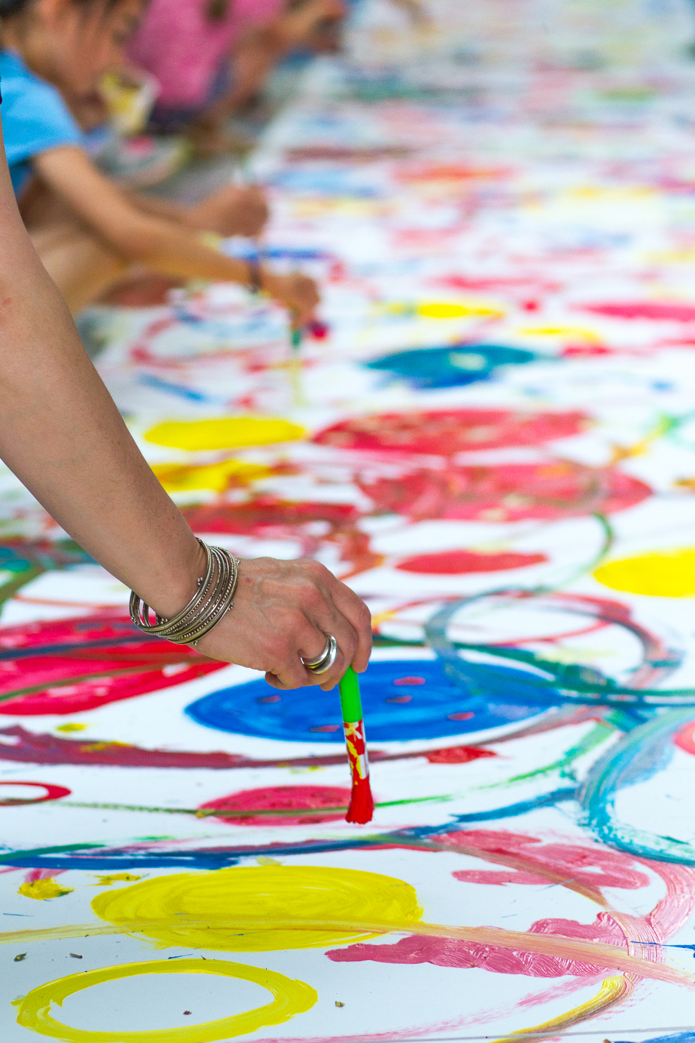 Atelier fleurs à la galerie le Livart